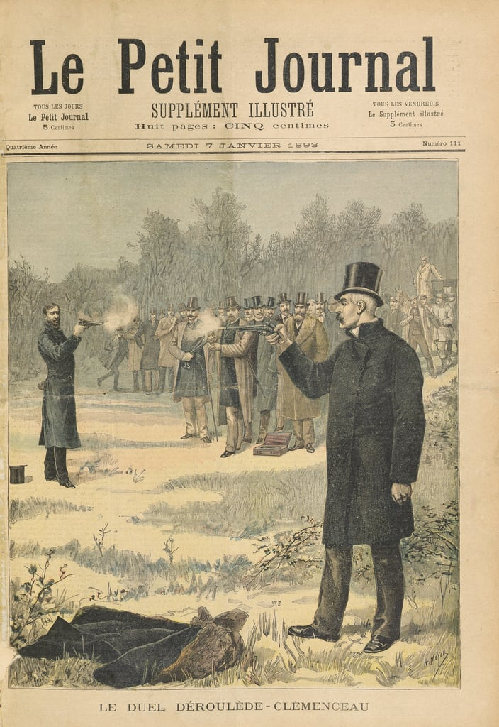 Duel entre Paul Déroulède et Georges Clemenceau.